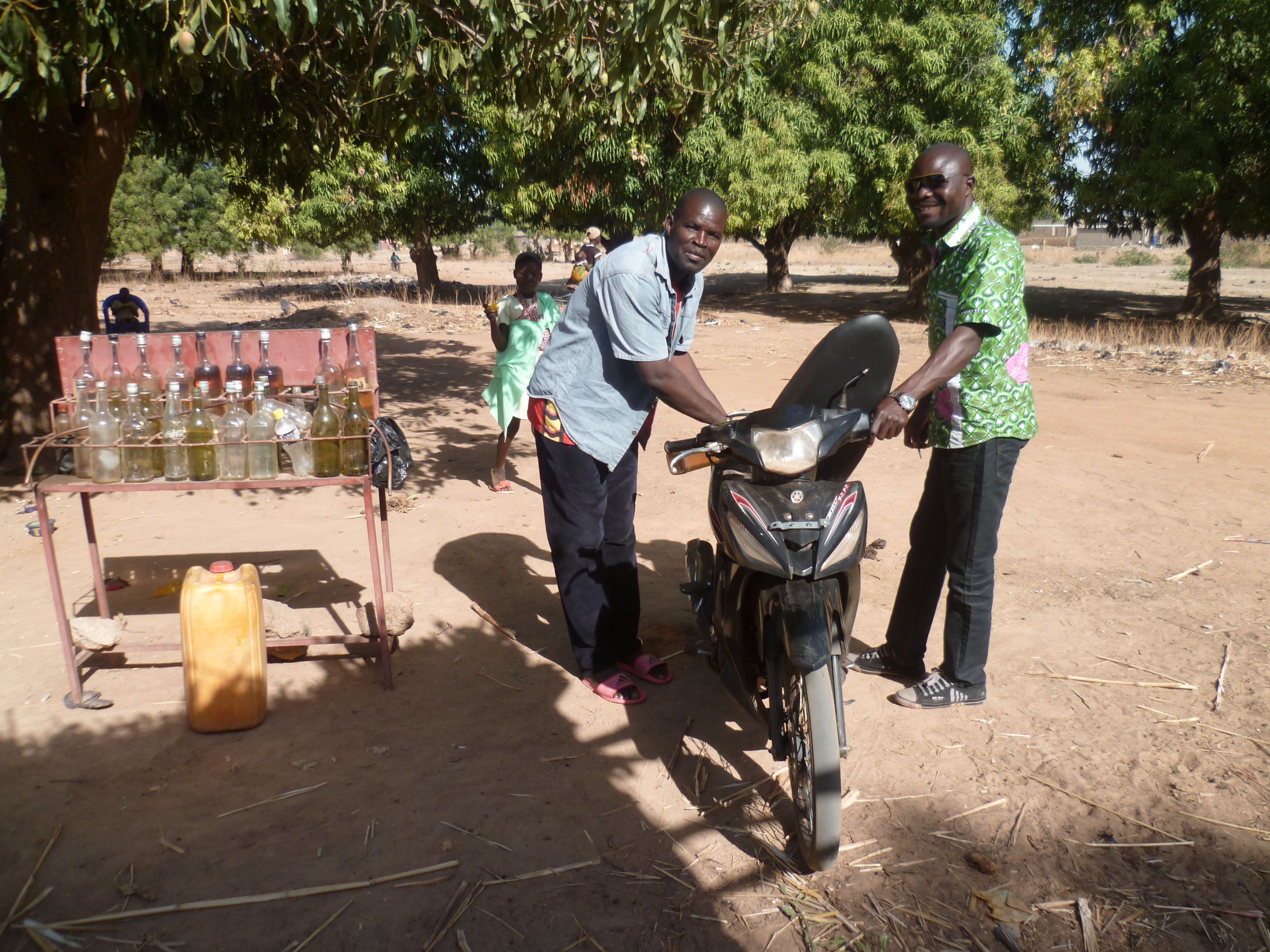 Burkina Faso - Boromo - Comme partout dans ce pays, la vente d'essence pour les 2 roues est faite par des petits points de vente. En l’occurrence, ici un couple sympathique à qui j'ai pu rapporter leurs photos lors d'un autre voyage. This is an image with the theme "Africa on the Move or Transport" from: Burkina Faso